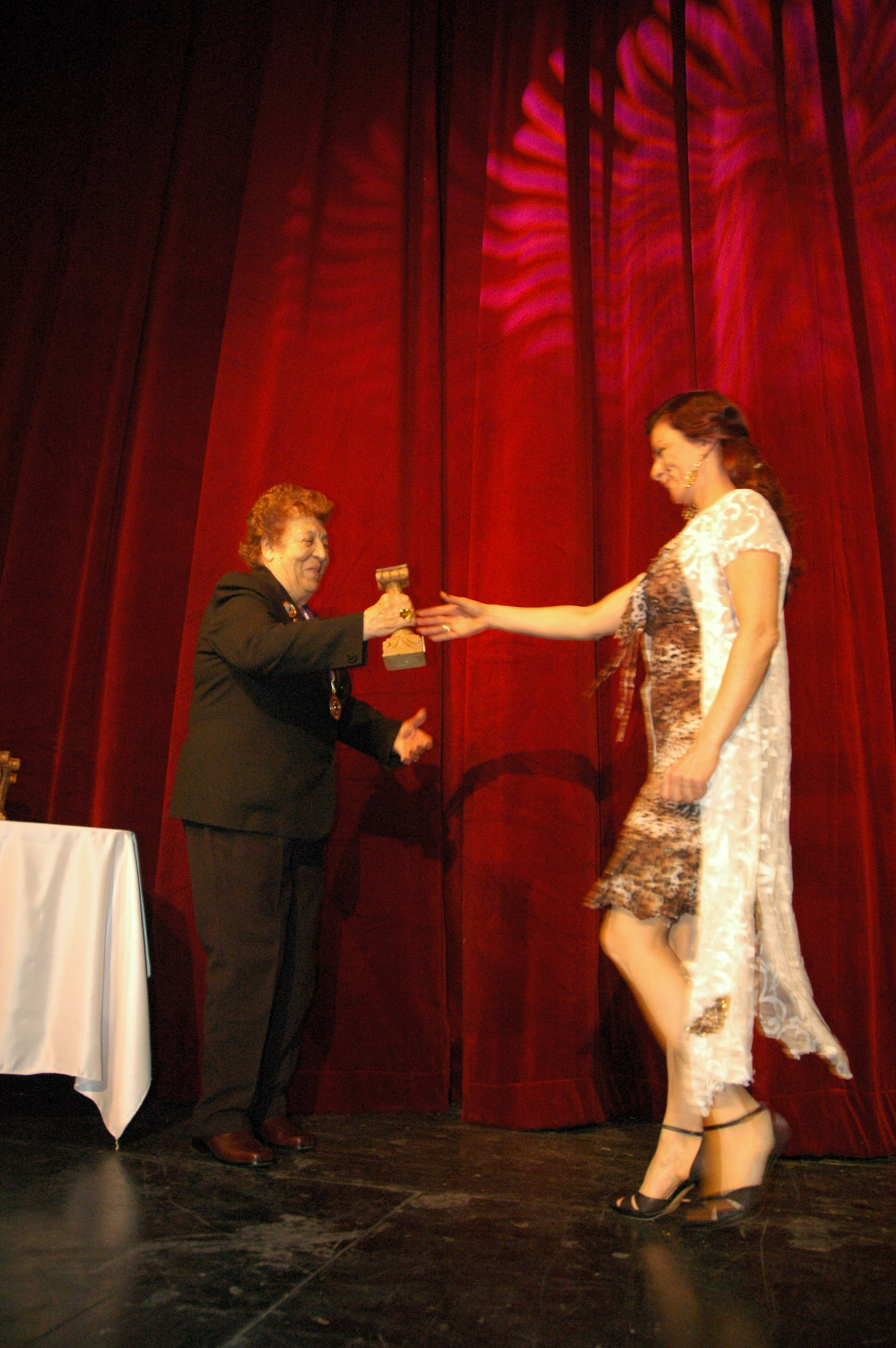 2006-2007 Yardımcı Kadın Oyuncu: Hülya Şen, Paramparça, Hadi Çaman Yeditepe Oyuncuları